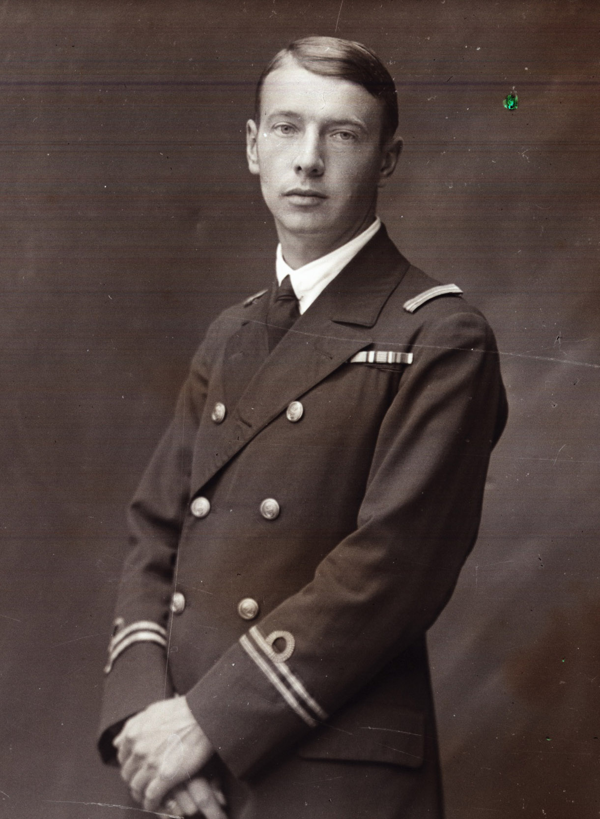 Nikolaus von Martiny in der Uniform eines österreichischen Marineoffiziers, Liezen 1928 (Fotostudio Eisler Liezen)